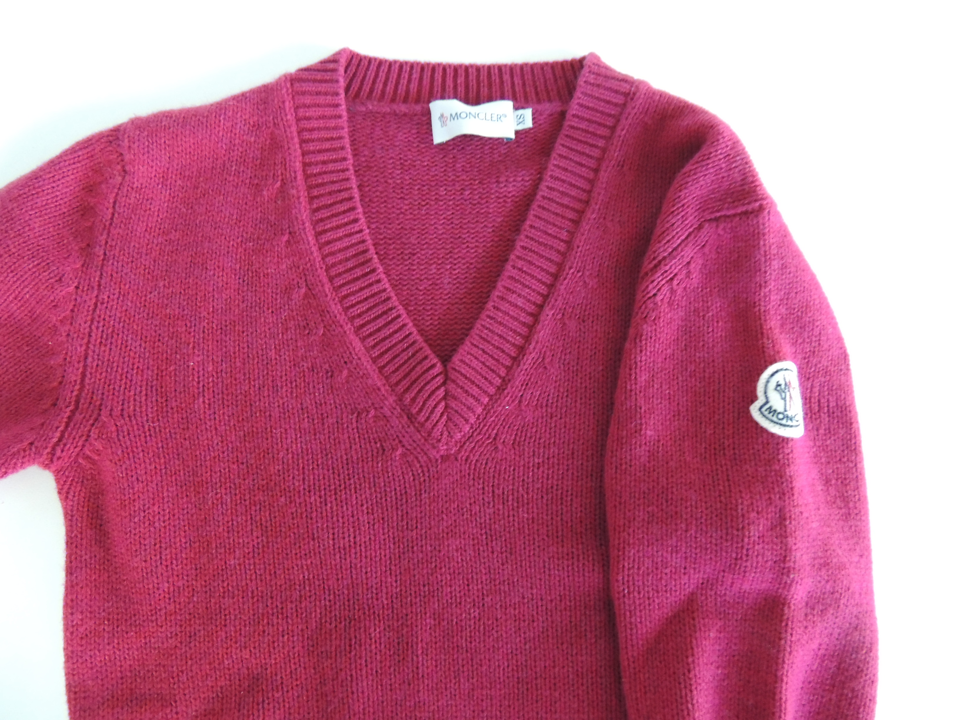 pull-over féminin de marque Moncler, col V, manches longues